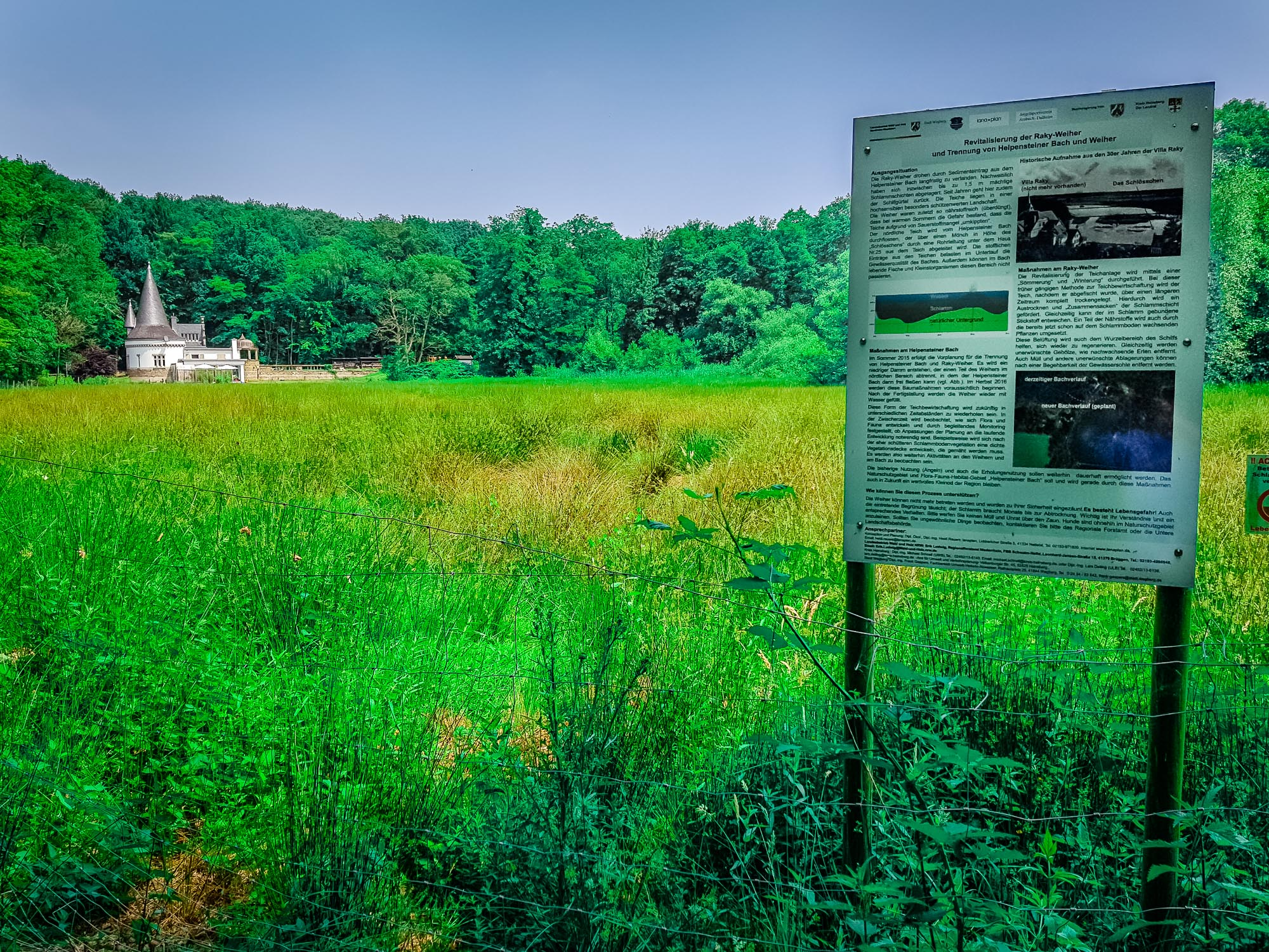 Dies ist der ehemalige Raky-Weiher im Juni 2018. Der Weiher enthält kein Wasser mehr. Das Gelände des ehemaligen Weihers ist vollständig eingezäunt. Schilder verweisen auf den Sedimenteintrag durch den Helpensteiner Bach und auf Verunreinigungen hin. Betreten des Geländes bedeutet Lebensgefahr.